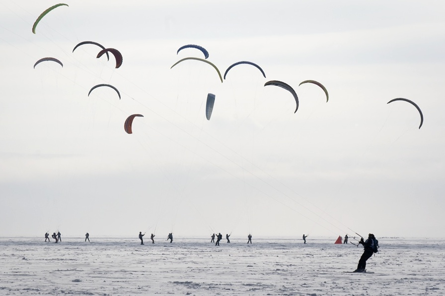 Ежегодные соревнования по сноукайтингу "Жигулевское море 2011". Тольятти. Россия